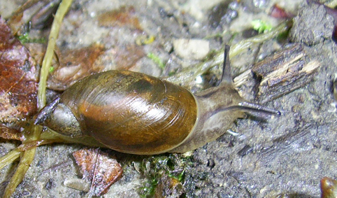 Бурштинівка (янтарка) звичайна Succinea putris (Linnaeus, 1758)